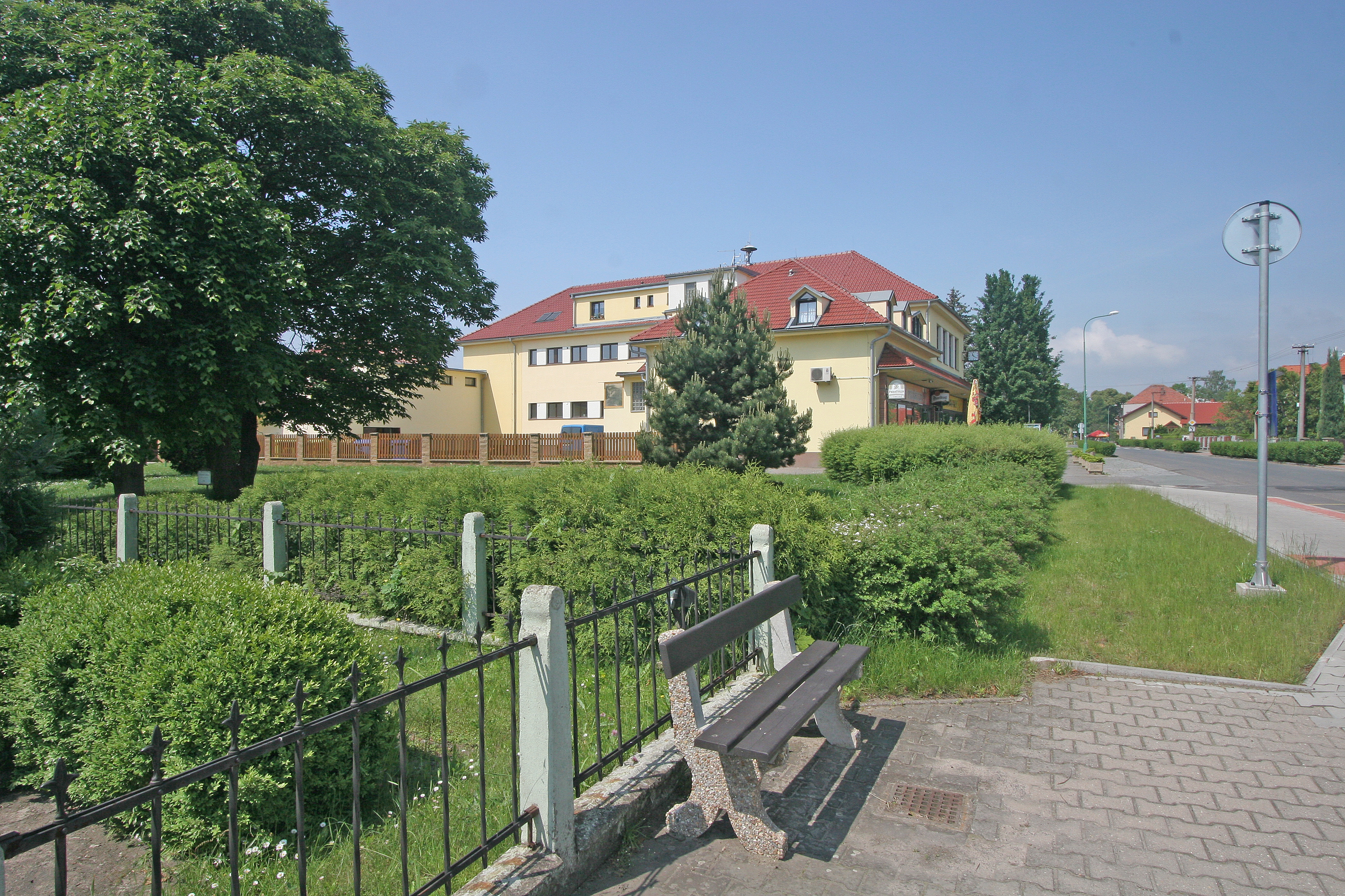 Čeperka obecní úřad